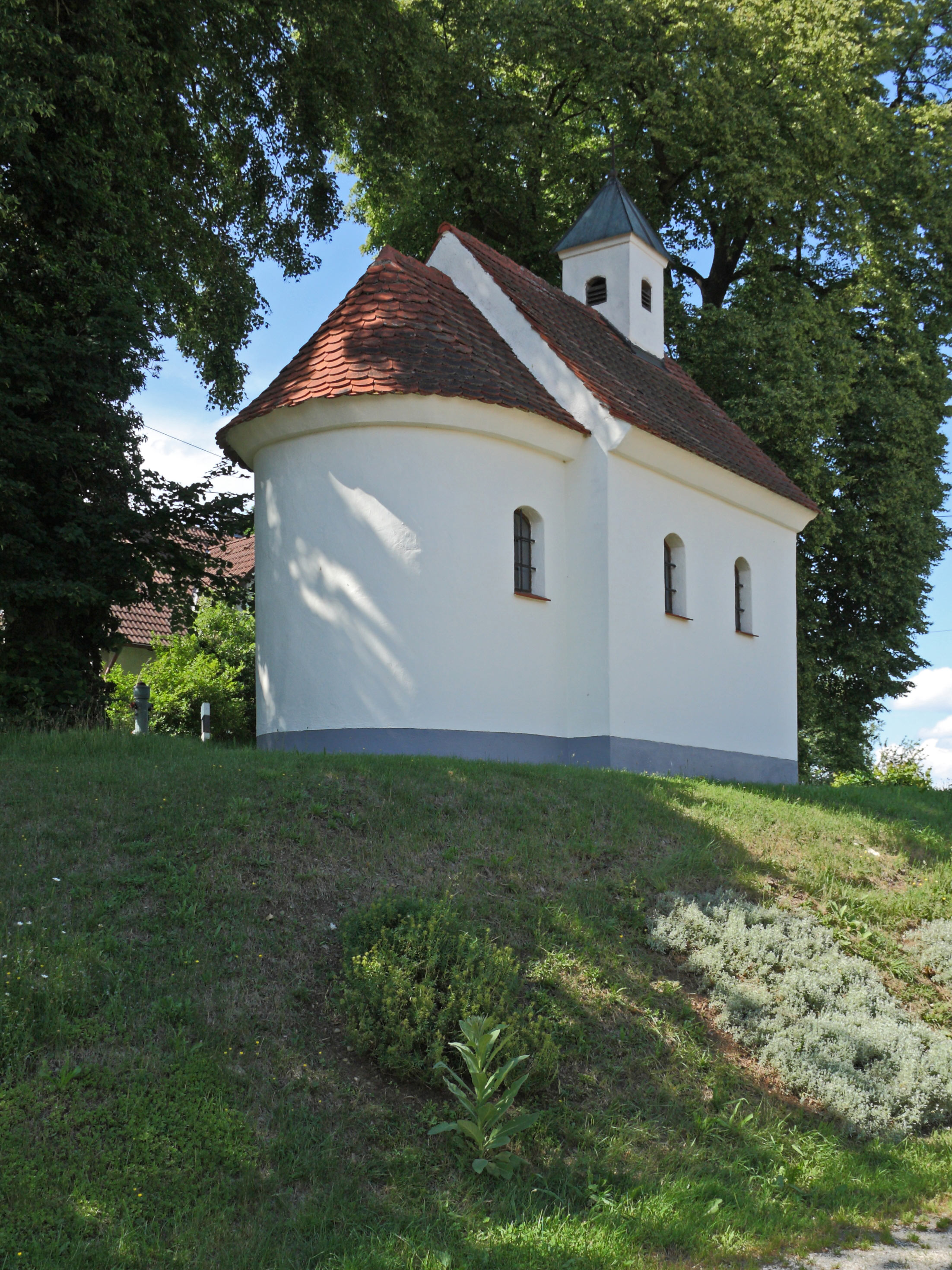 Kath. Kapelle St. Maria in Hilbertshausen; Ansicht der um 1835 erbauten Kapelle von Südwesten